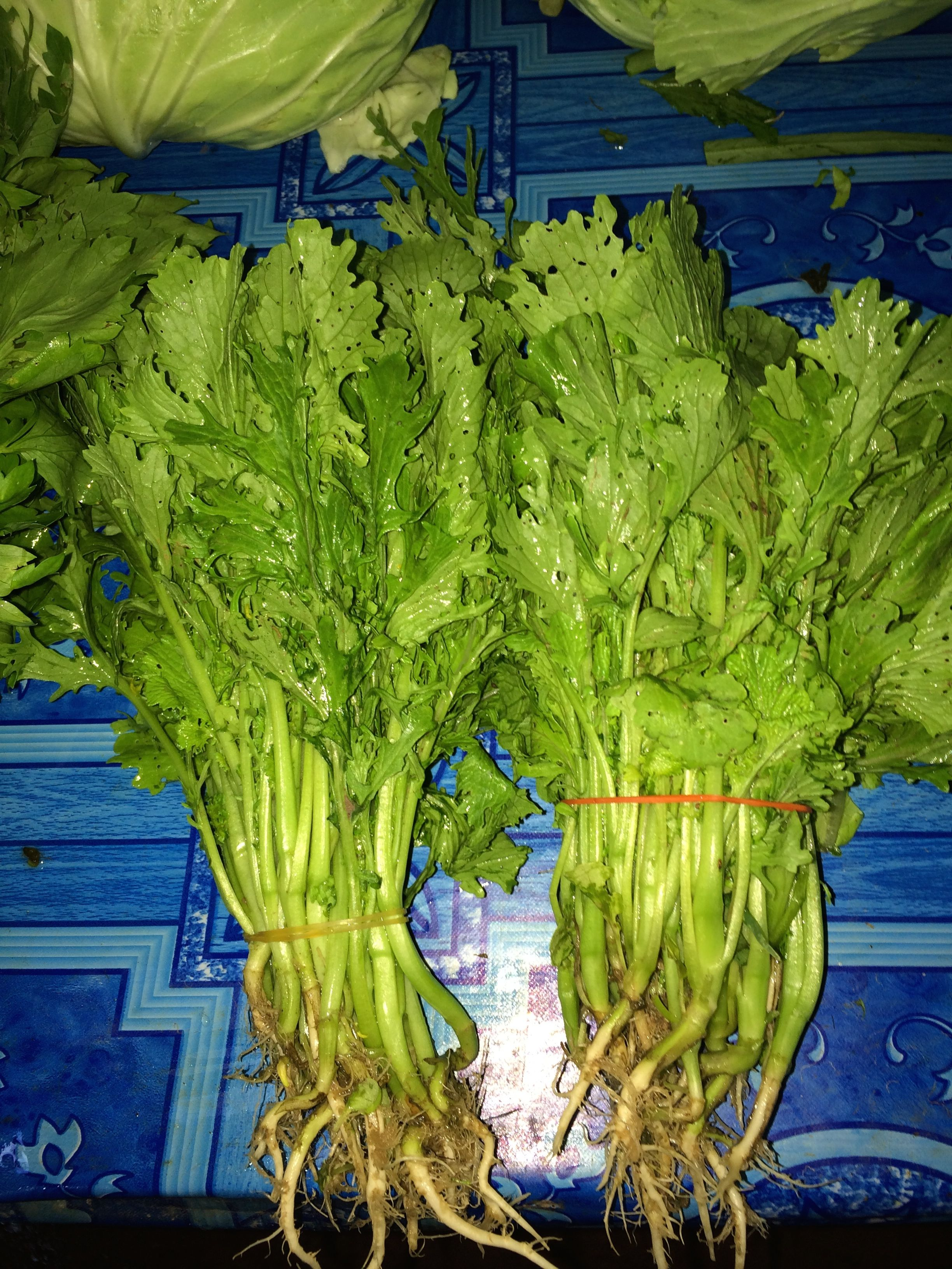 Pak kad soy ผักกาดสร้อย moutarde pissenlit sakon nakhon, thailand